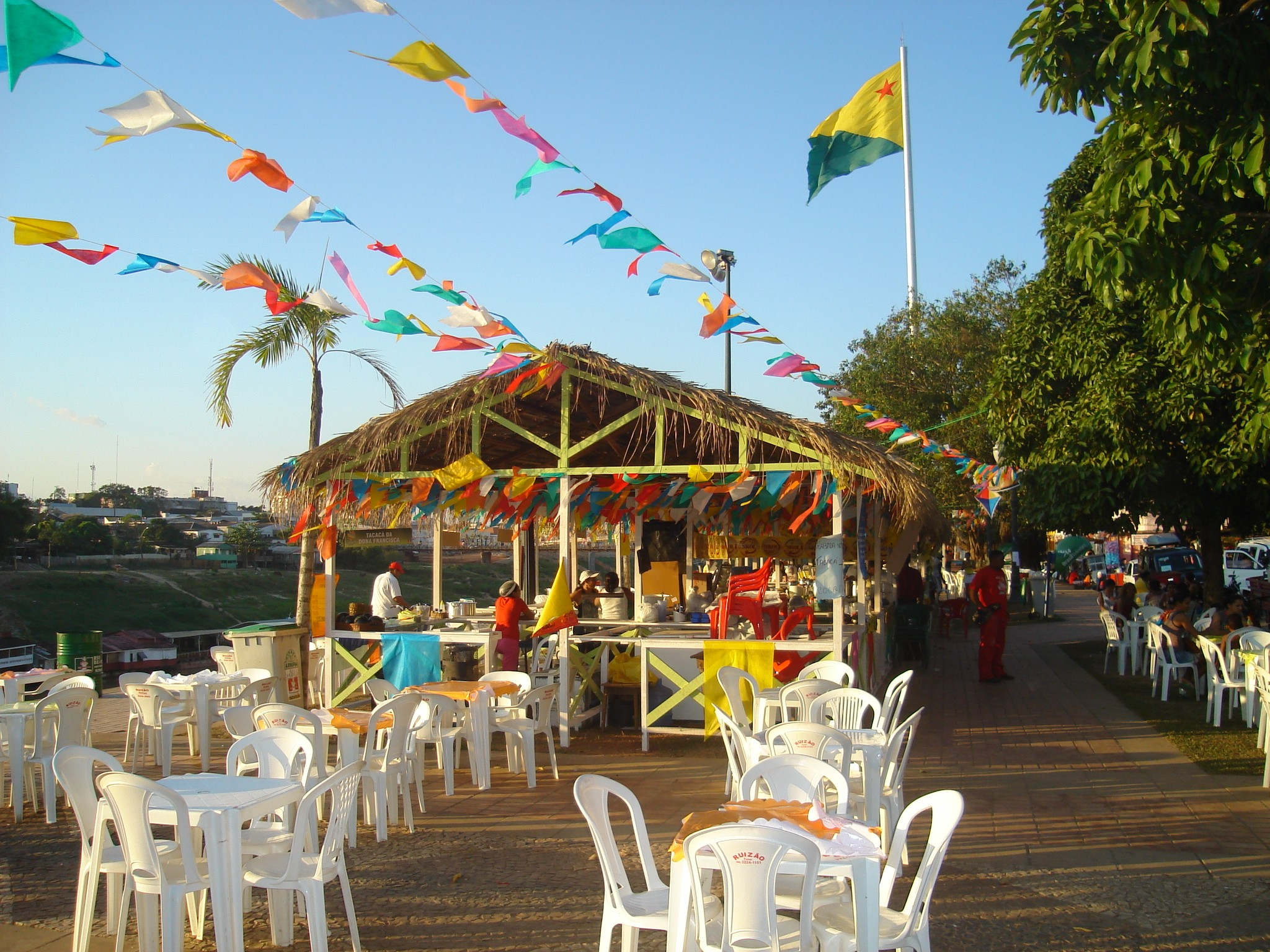 Barracas de Festa Junina na Gameleira, Rio Branco, Acre, Brasil. Fonte Autor: Filipe Mesquita de Oliveira --Filipe Mesquita discuta30px 05:18, 18 Julho 2006 (UTC)